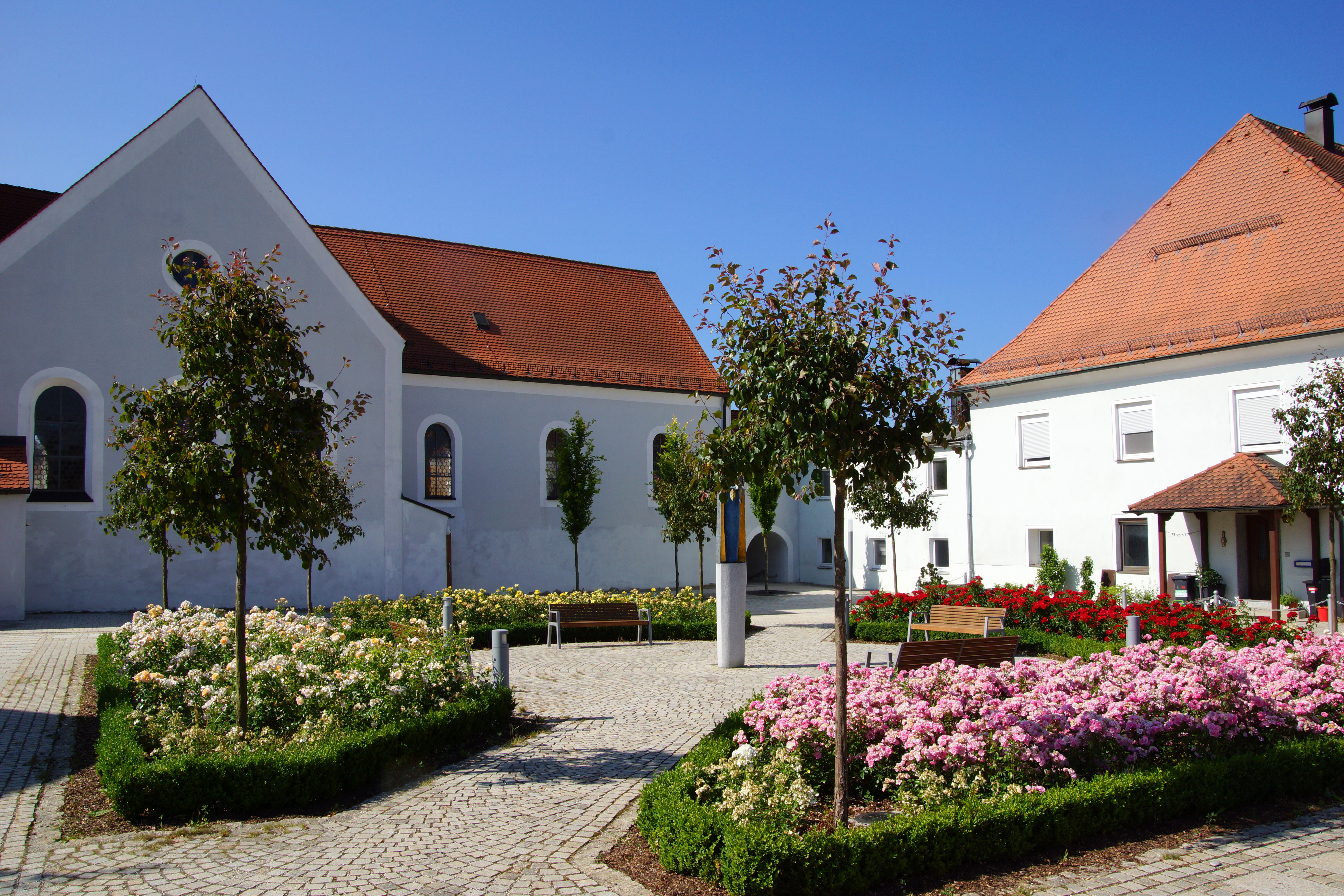 Die Gemeinde Ursensollen in der Oberpfalz